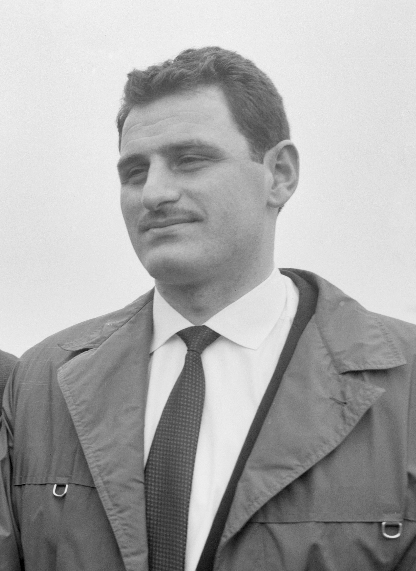 Russische waterpolo-ploeg op Schiphol aanvoerder Msjoenieradze en Gogoladze (kop)